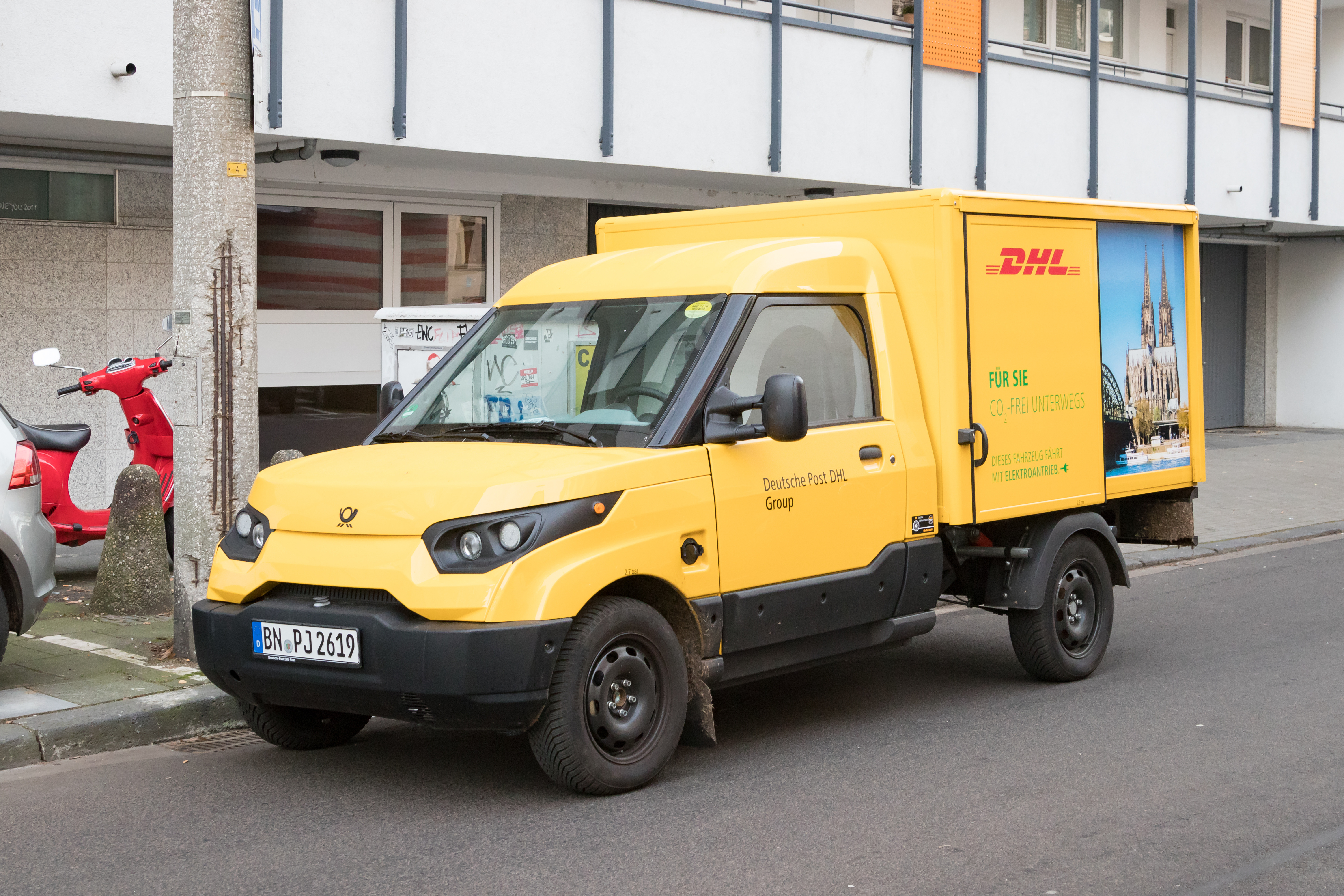 StreetScooter der Deutsche Post DHL Group (Elektrofahrzeug, Modell StreetScooter Work) in Köln